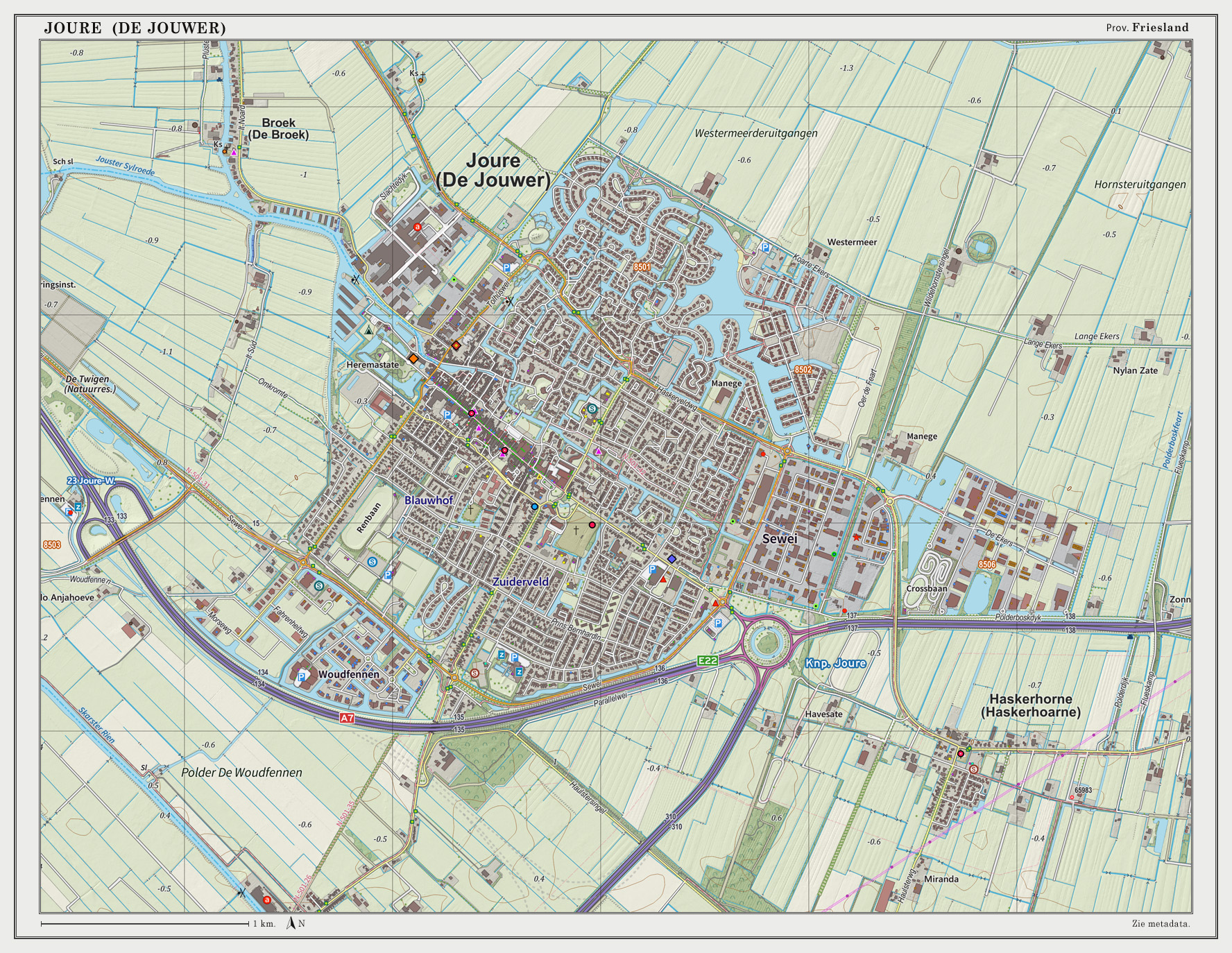 Topografische kaart van Joure (woonplaats). Resolutie: 300 pixels/km. Kaartbeeld samengesteld uit de open geodata van de Top10NL en Top25namen (Basisregistratie Topografie, Kadaster), Creative Commons BY licentie. Gebouwvlakken uit open geodata BAG extract. Wegen uit de OpenStreetMap. Reliëfschaduw uit de Actuele Hoogtekaart AHN2. Samenstelling en kleurenschema: Jan-Willem van Aalst, met QGIS2. Zie ook de Legenda.